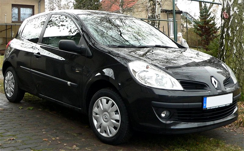 Renault Clio C (III), 3. generation, built 2005, 1.2 16V 55kW/75PS